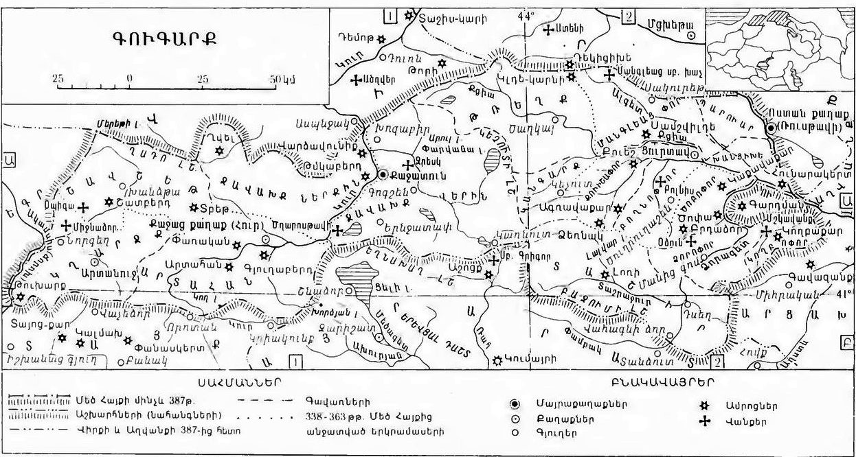 Գուգարք